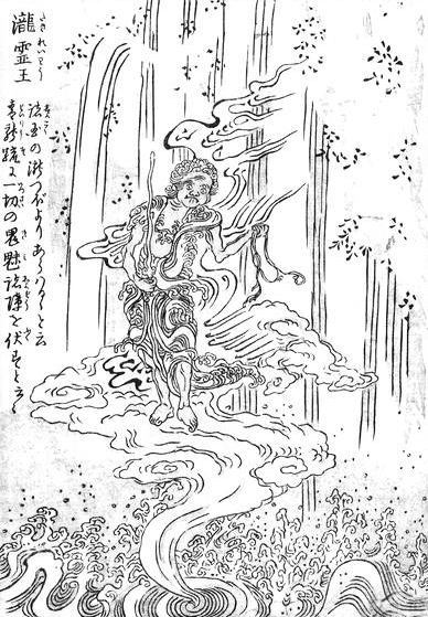 Takirei-ō (滝霊王) from the Konjaku Hyakki Shūi (今昔百鬼拾遺)